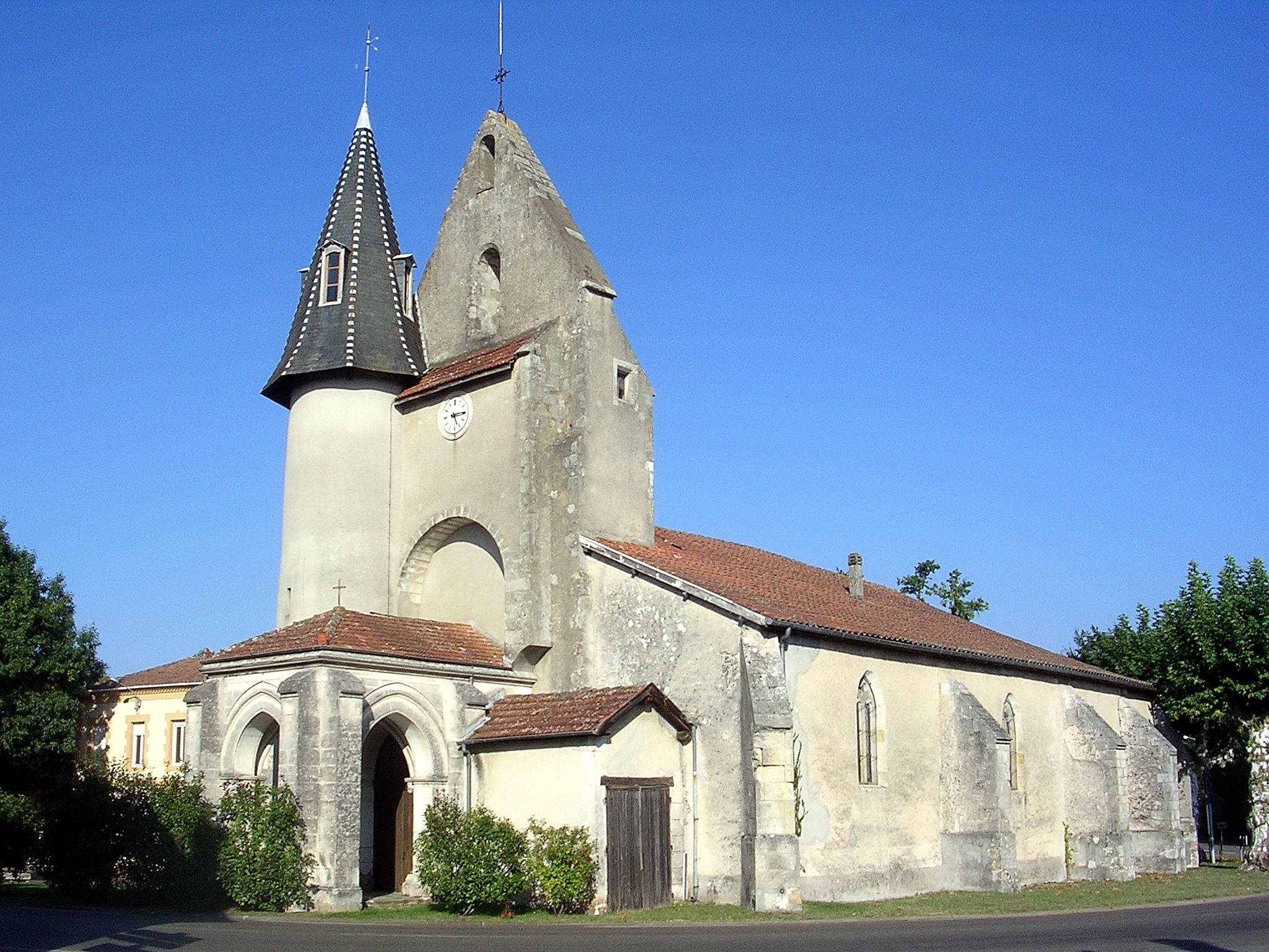 Église Saint-Martin-et-Saint-Eutrope de Trensacq, département français des Landes